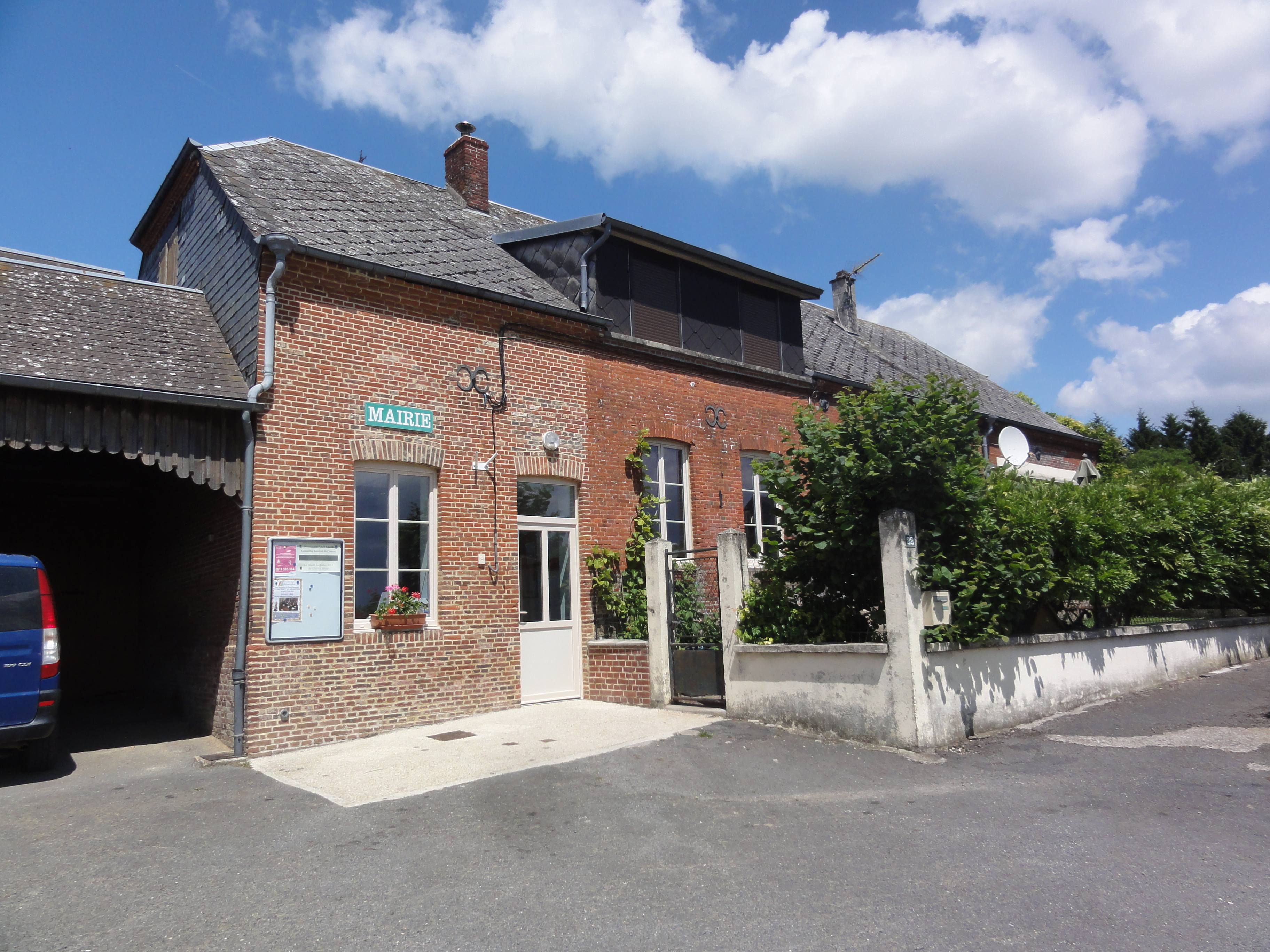 Dohis (Aisne) mairie